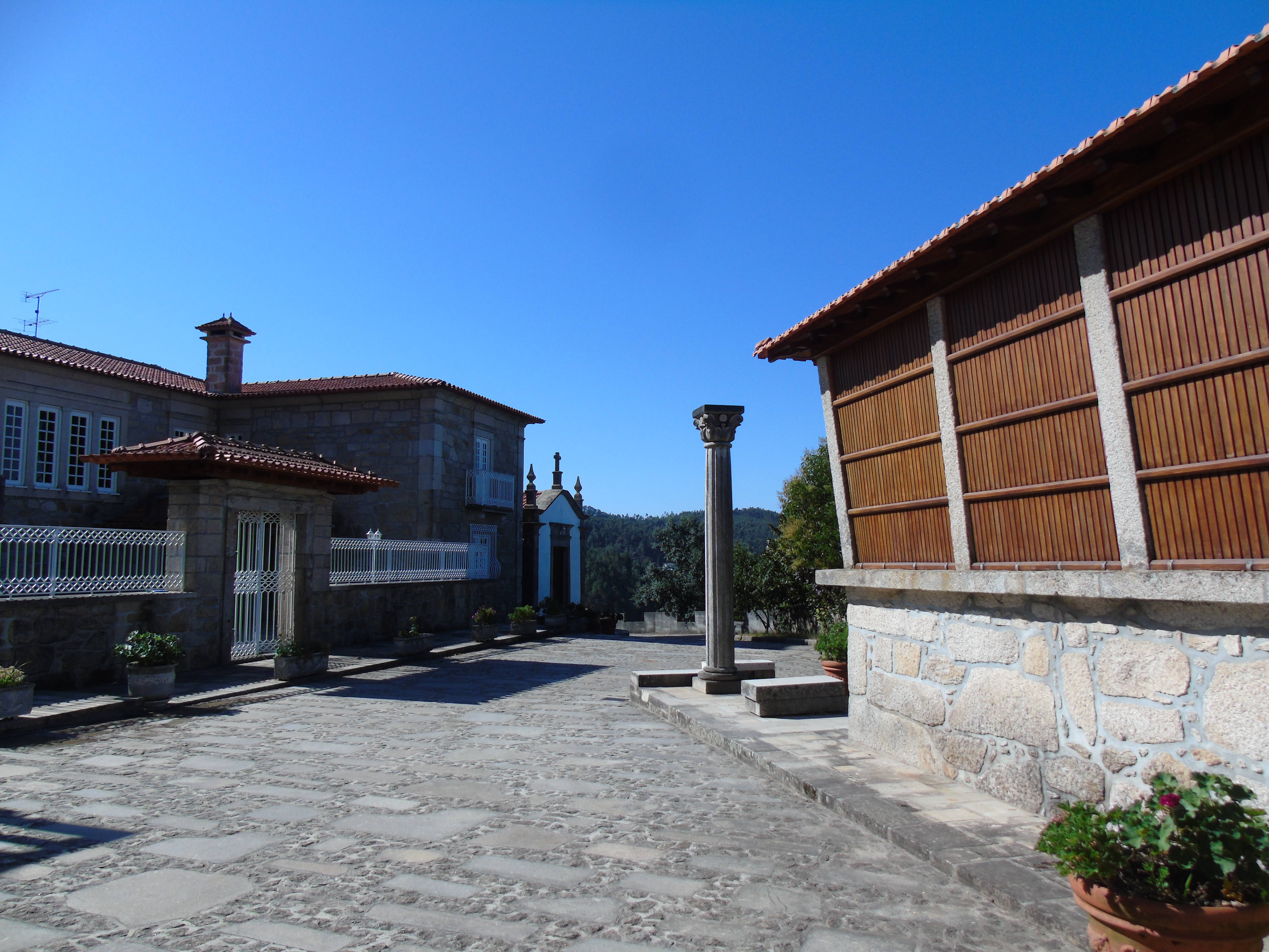 Frente da Casa do Castelo de Fermedo